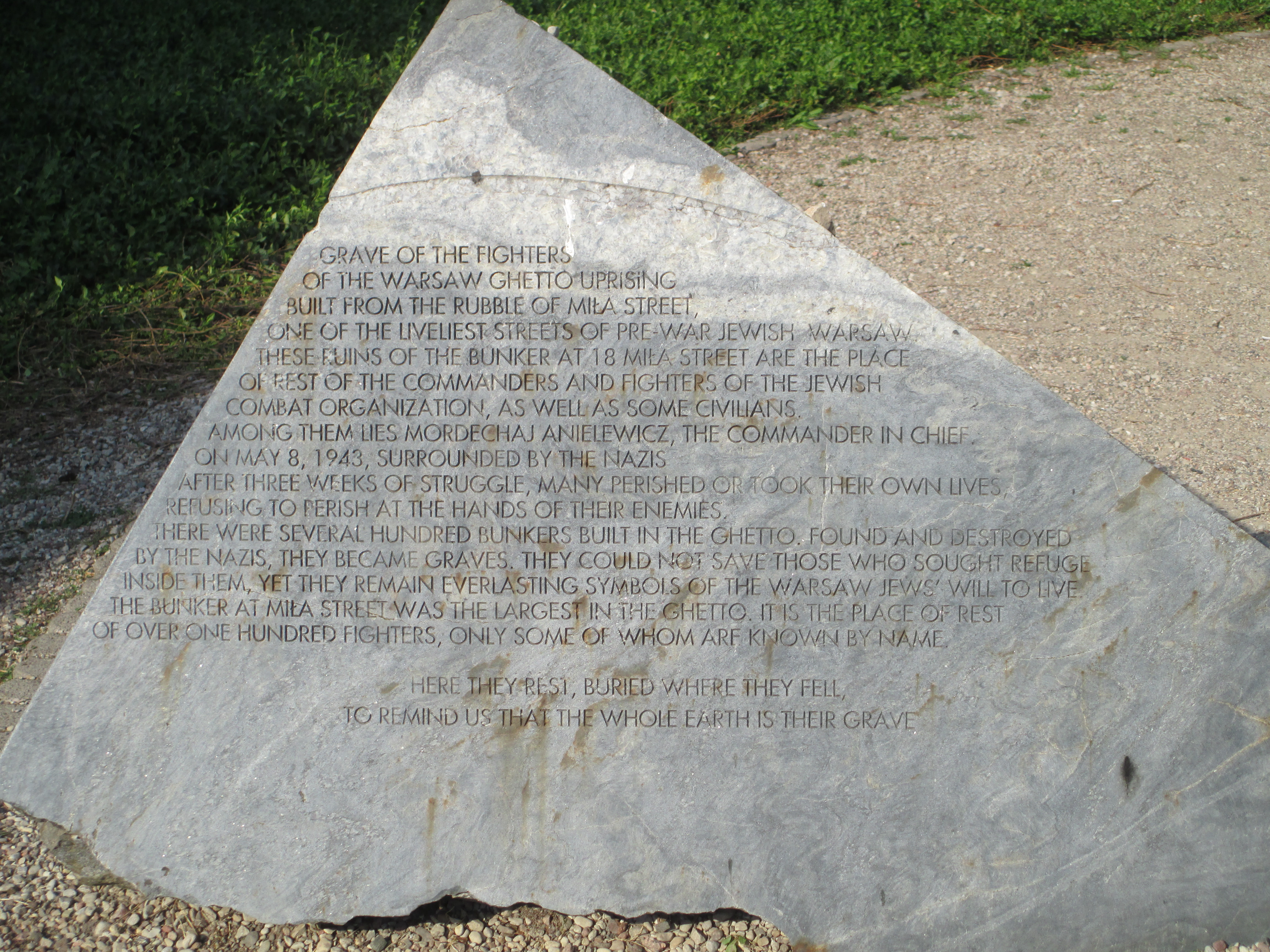 אנדרטה ללוחמי גטו ורשה במילא 18